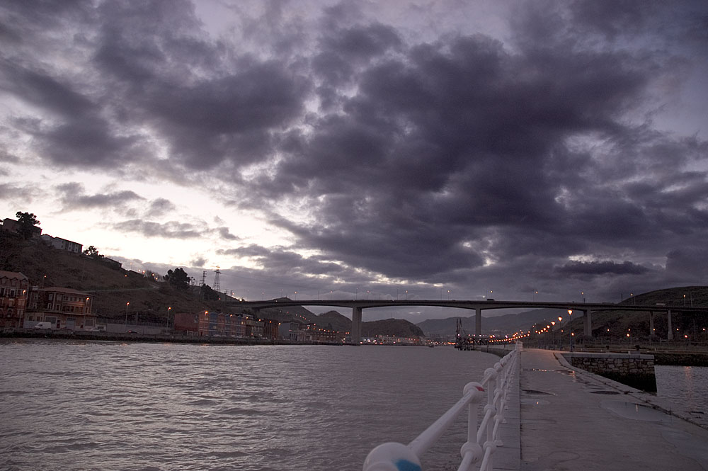 Barakaldo